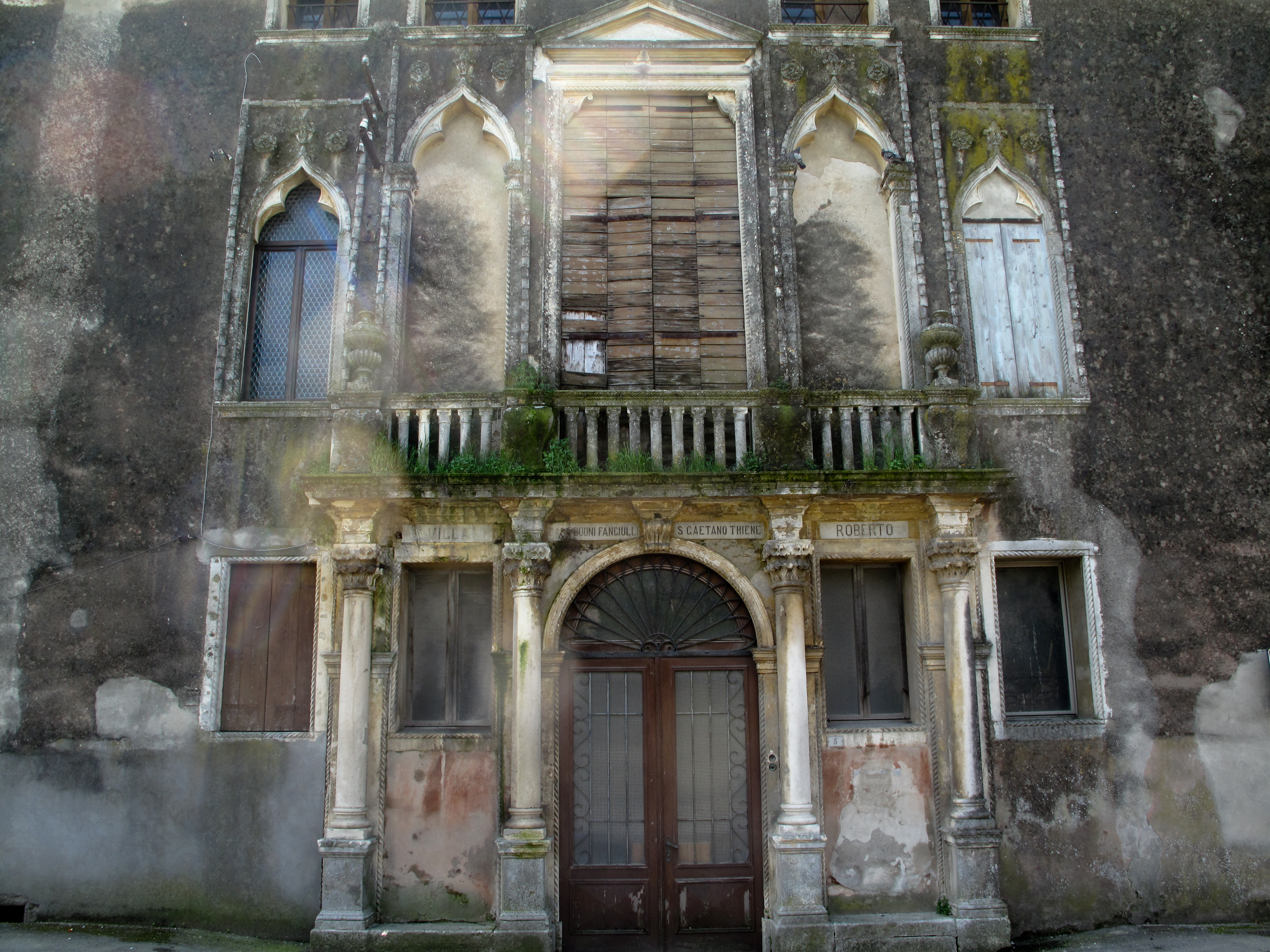 Costozza di Longare - Casa dei Buoni Fanciulli